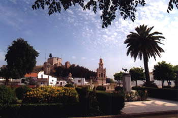 Peña del Gallo en Morón de la Frontera